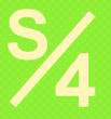 Quartiersmarketinglogo des Spessartviertels in Dietzenbach